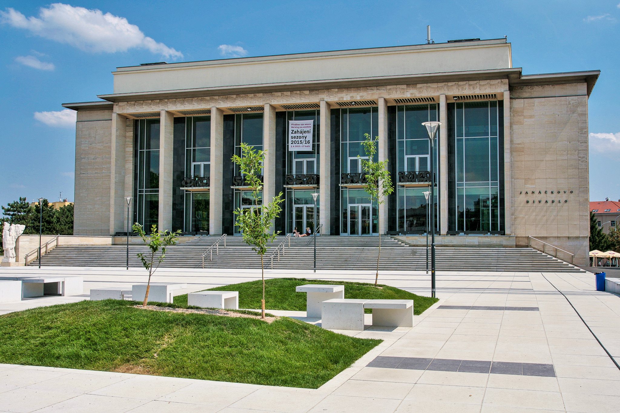 Park Koliště, rekreační plocha na střeše podzemních garáží před Janáčkovým divadlem, Rooseveltova 711/3, Brno.